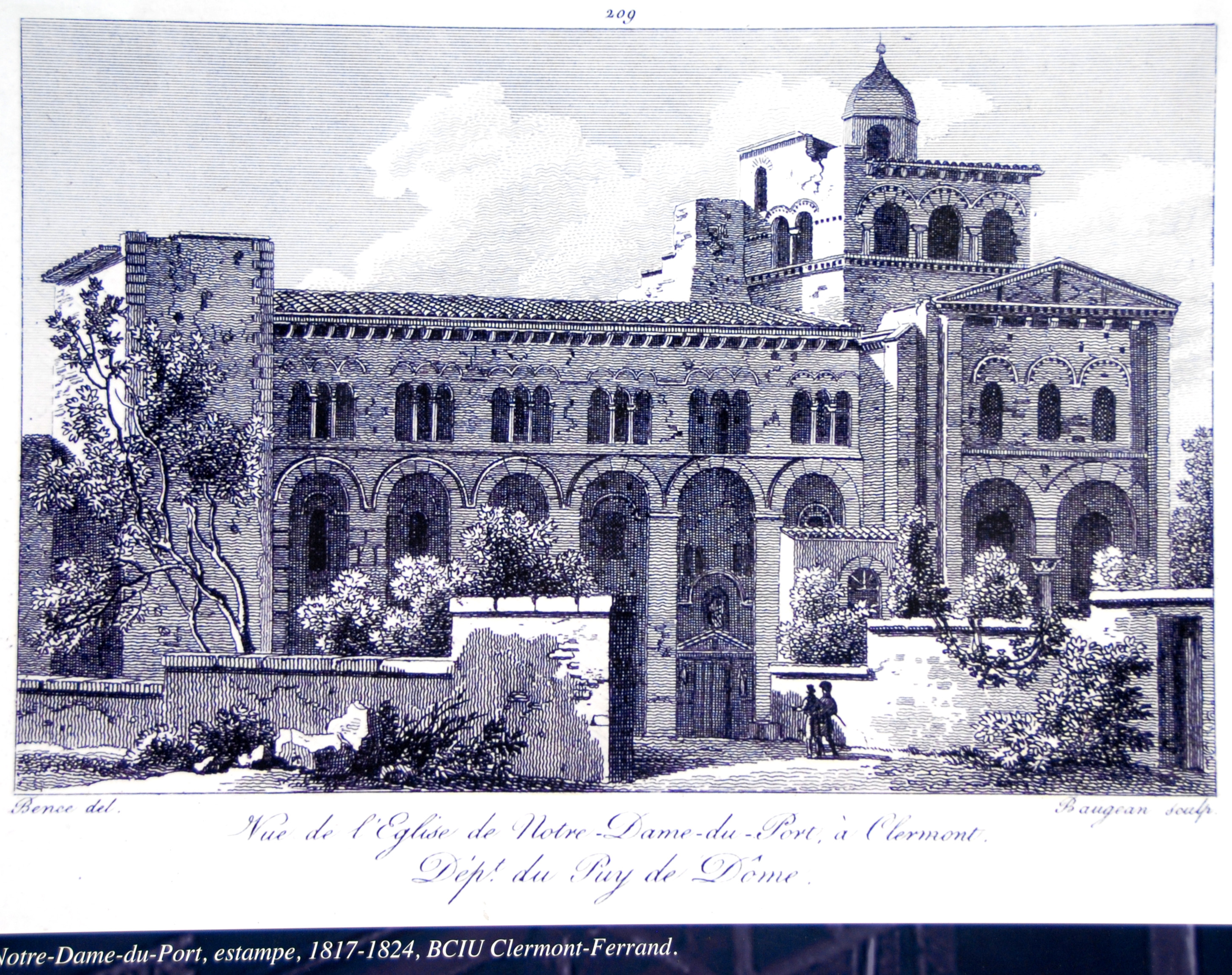 Notre-Dame du Port, alte Druckgrafik von Anfang des 19. Jhs.